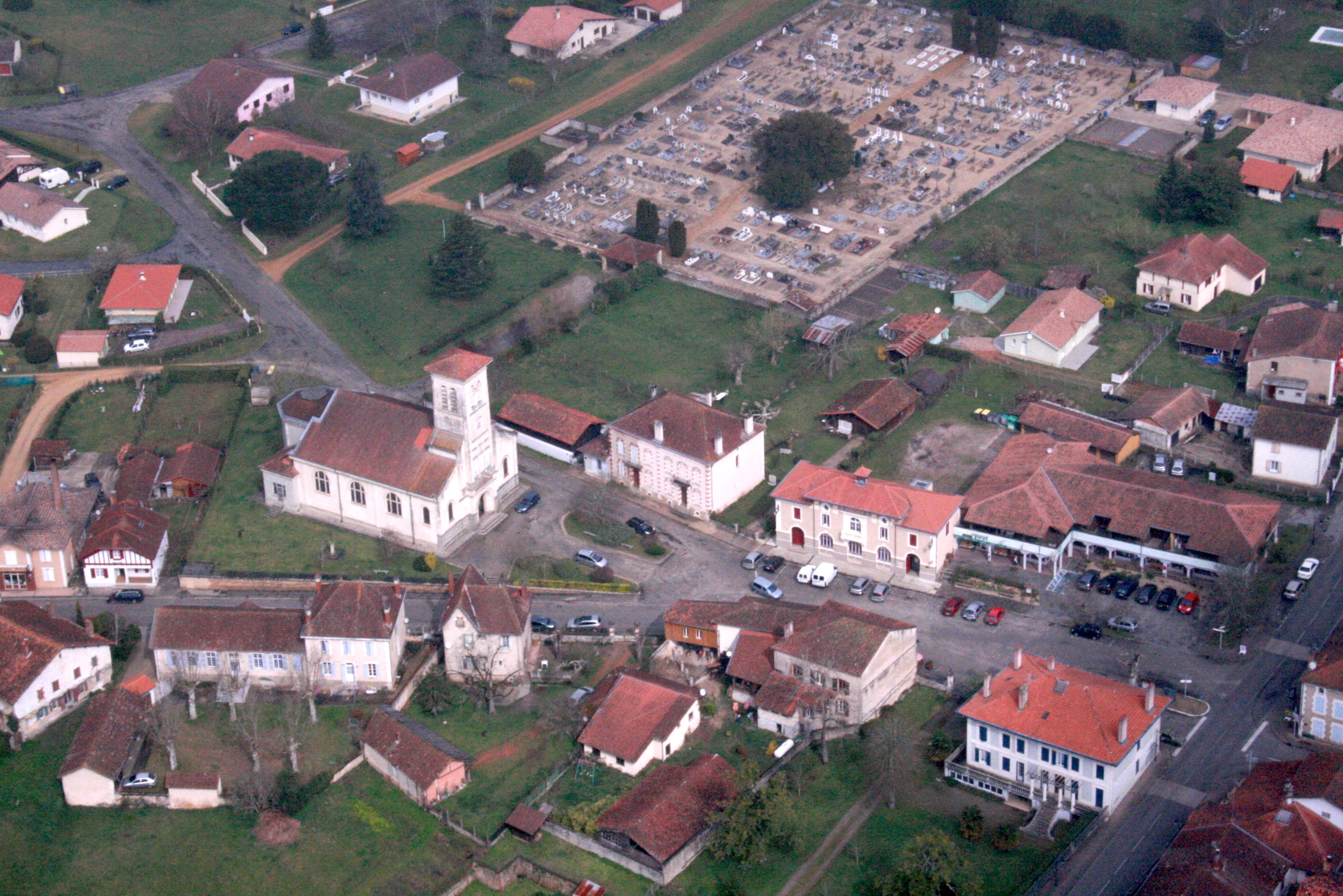 Photographie aérienne du centre ville de Brocas, prise le 6 avril 2013.